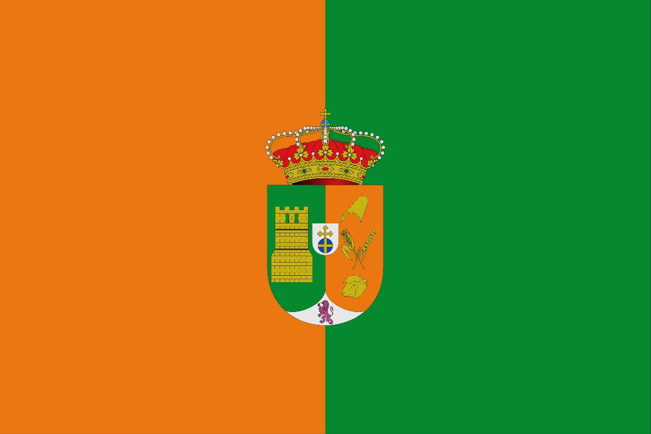 Paño rectangular cuya longitud es una vez y media su altura. Dividido verticalmente en dos mitades, siendo la más cercana al asta de color naranja y la mitad del batiente de color verde. En el centro, el escudo de la Junta vecinal.